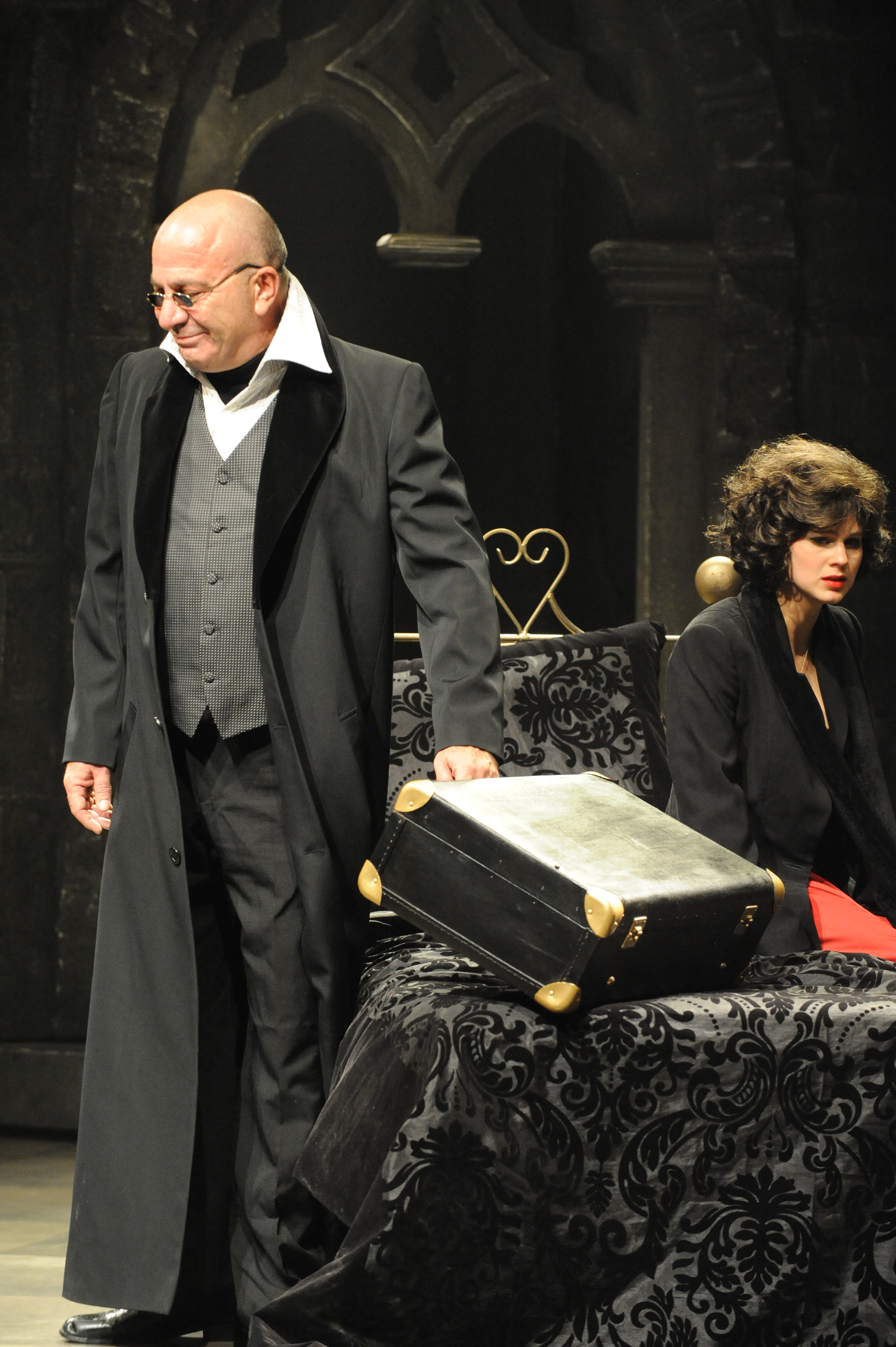 שמרית לוסטיג ואריה צ'רנר בהצגה "אהובת הדרקון", מאת ובבימויו של מייקי גורביץ', תיאטרון החאן